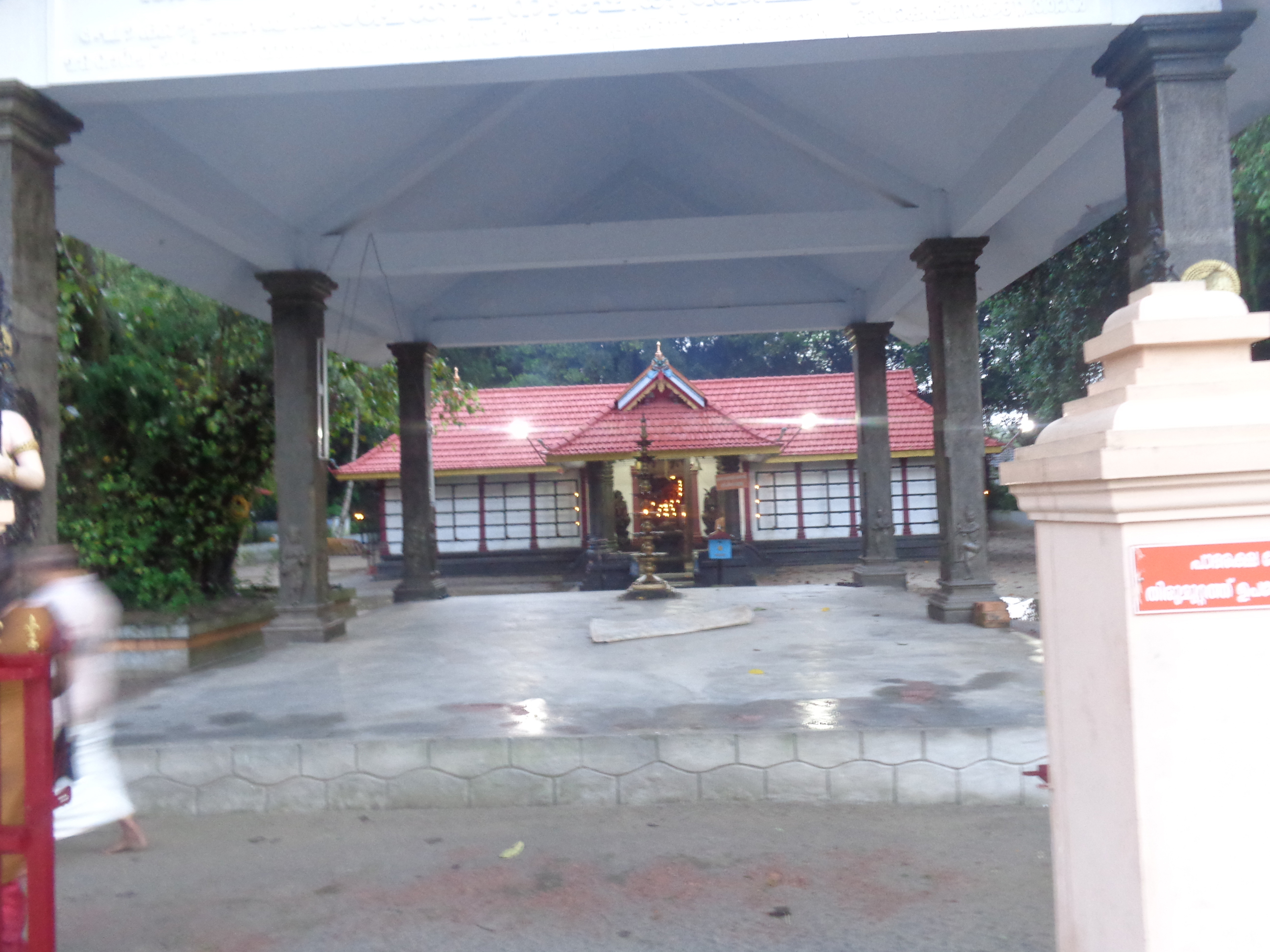 azhakiyakavu temple, pullikkanakku, kayamkulam